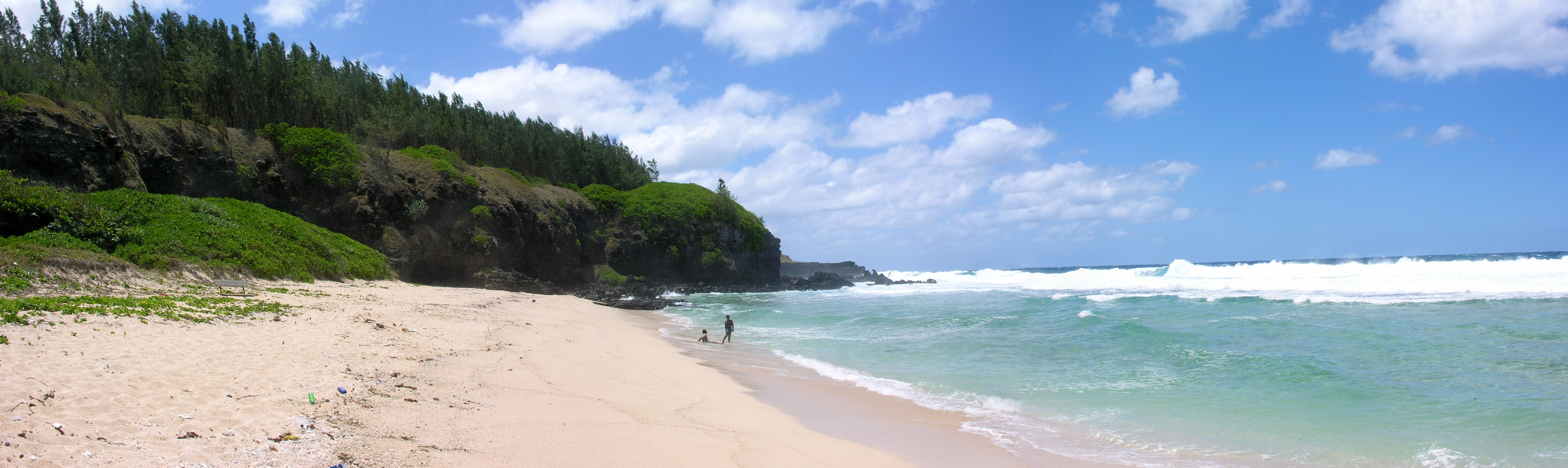 Mauritius, Gris Gris Beach